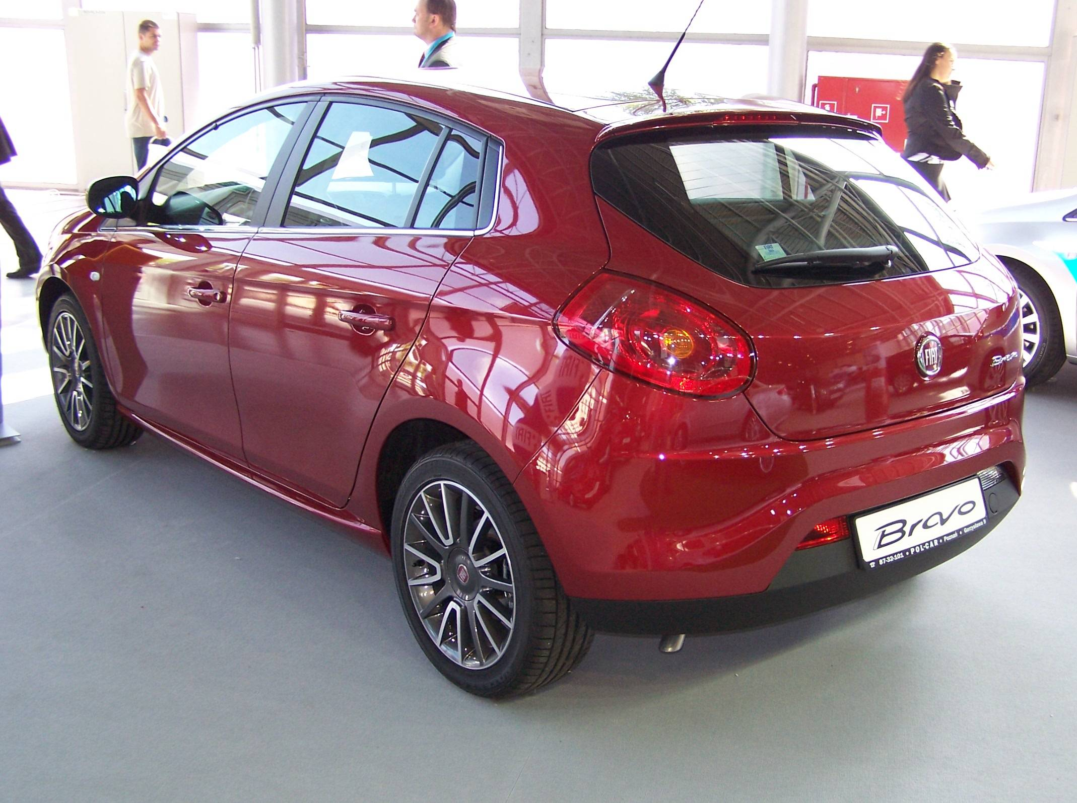 Fiat Bravo 2007